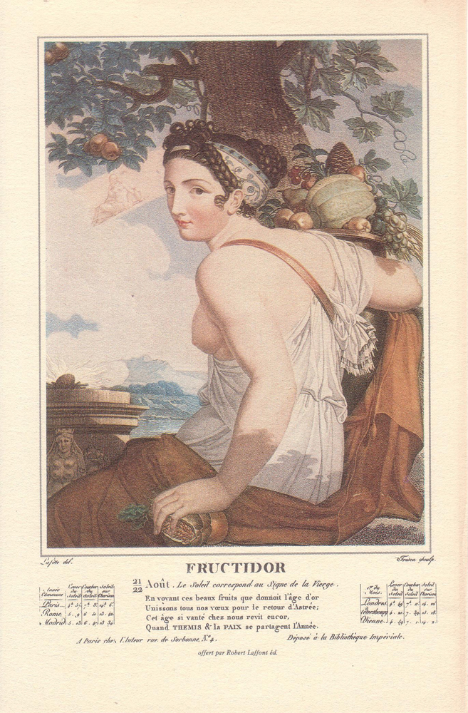 French Revolutionary Calendar FRUCTIDOR 21-22 Août: Le Soleil correspond au Signe de la Vierge En voyant ces beaux fruits que donnoit l'âge d'or Unissons tous nos voeux pour le retour d'Astrée Cet âge si vanté chez nous revit encor Quand THEMIS & la PAIX se partagent l'Année